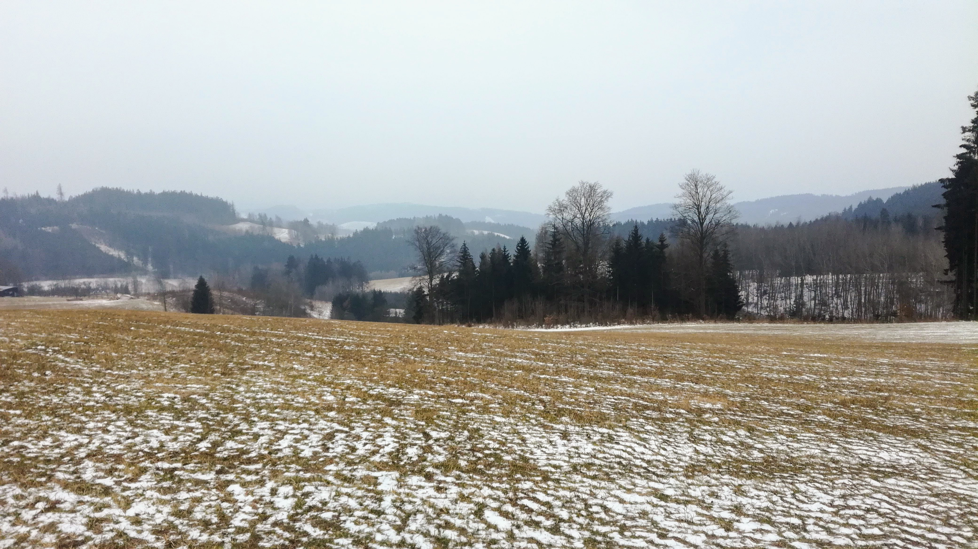 Radvanická vrchovina na východ ze sedla mezi Turovem a Pustinami. Vlevo Stárkovské kuesty, na obzoru vpravo Maternický hřbet Jestřebích hor